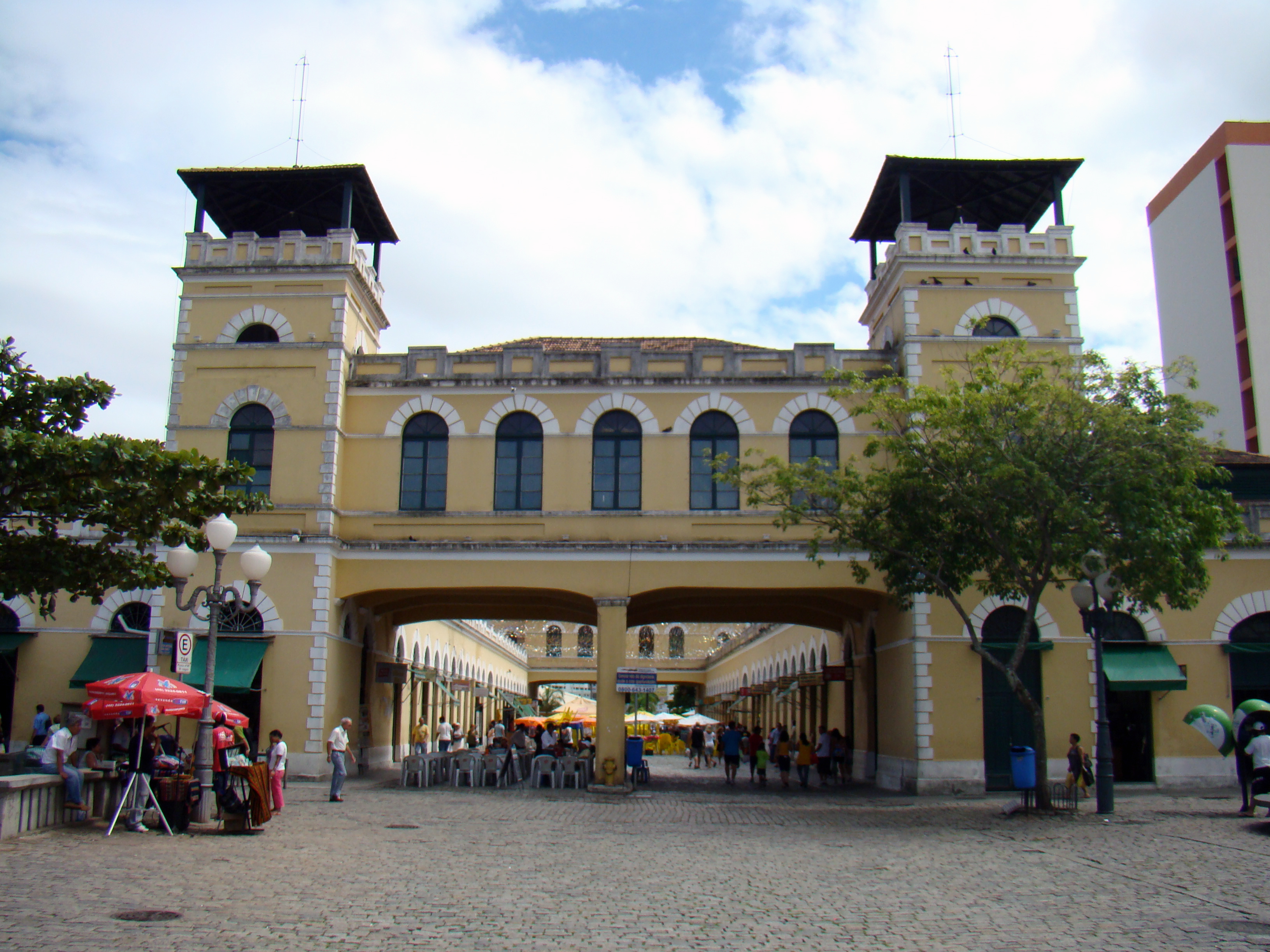 O Mercado Público Municipal de Florianópolis é um centro de comércio e edifício público histórico de Florianópolis, capital do estado de Santa Catarina, Brasil. O prédio é composto de duas alas – norte e sul – separadas por um vão central. No local acontece um variado comércio, principalmente de vestuário, alimentos, utensílios diversos e artesanato. Além disso, é um importante ponto de encontro e lazer da cidade, tanto para moradores quanto para turistas. Le Marché Public de Florianópolis (Mercado Público de Florianópolis, en portugais) est un centre commercial et un édifice public historique de la ville de Florianópolis, capitale de l'État de Santa Catarina au Brésil. Le bâtiment est composé de 2 ailes, nord et sud, séparées par une cour intérieure. On y trouve de nombreux commerces, principalement de vêtements, d'alimentation et d'artisanat. Il est, de plus, un important point de rencontres et de loisirs, tant pour les habitants de la ville que pour les touristes. Il fut construit à la fin du XIXe siècle pour partie, et sa configuration actuelle date de 1932. Il a déjà subit 2 incendies, en 1988 et 2005.